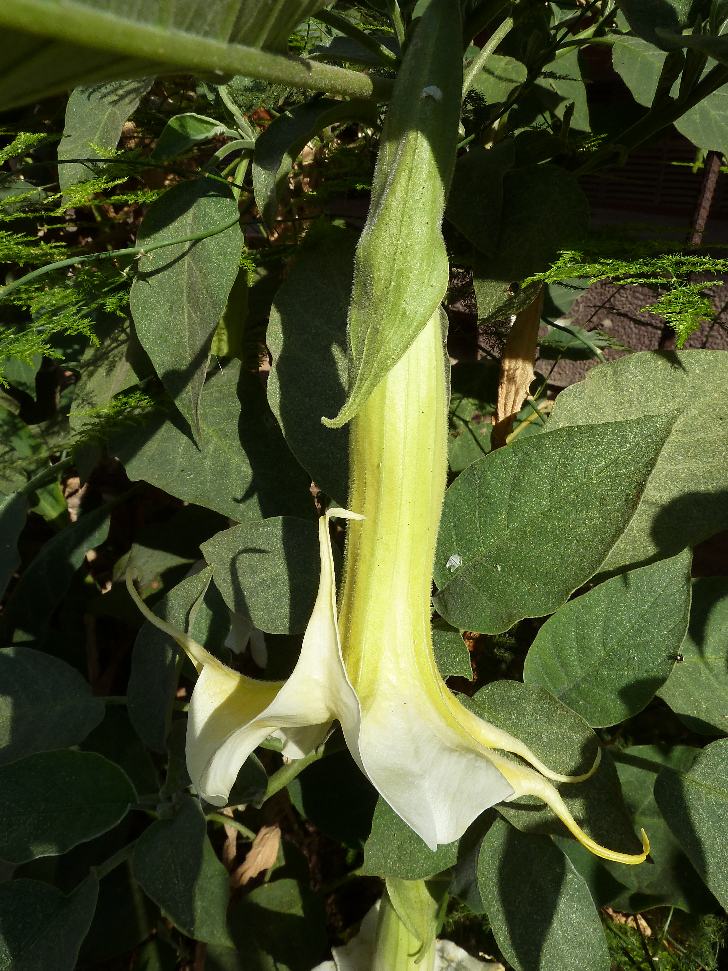 Brugmansia arborea (Árbol de las trompetas) : flor péndula - Calle del Rey Carlos III (seto ornamental cultivado), Águilas (Murcia, España).